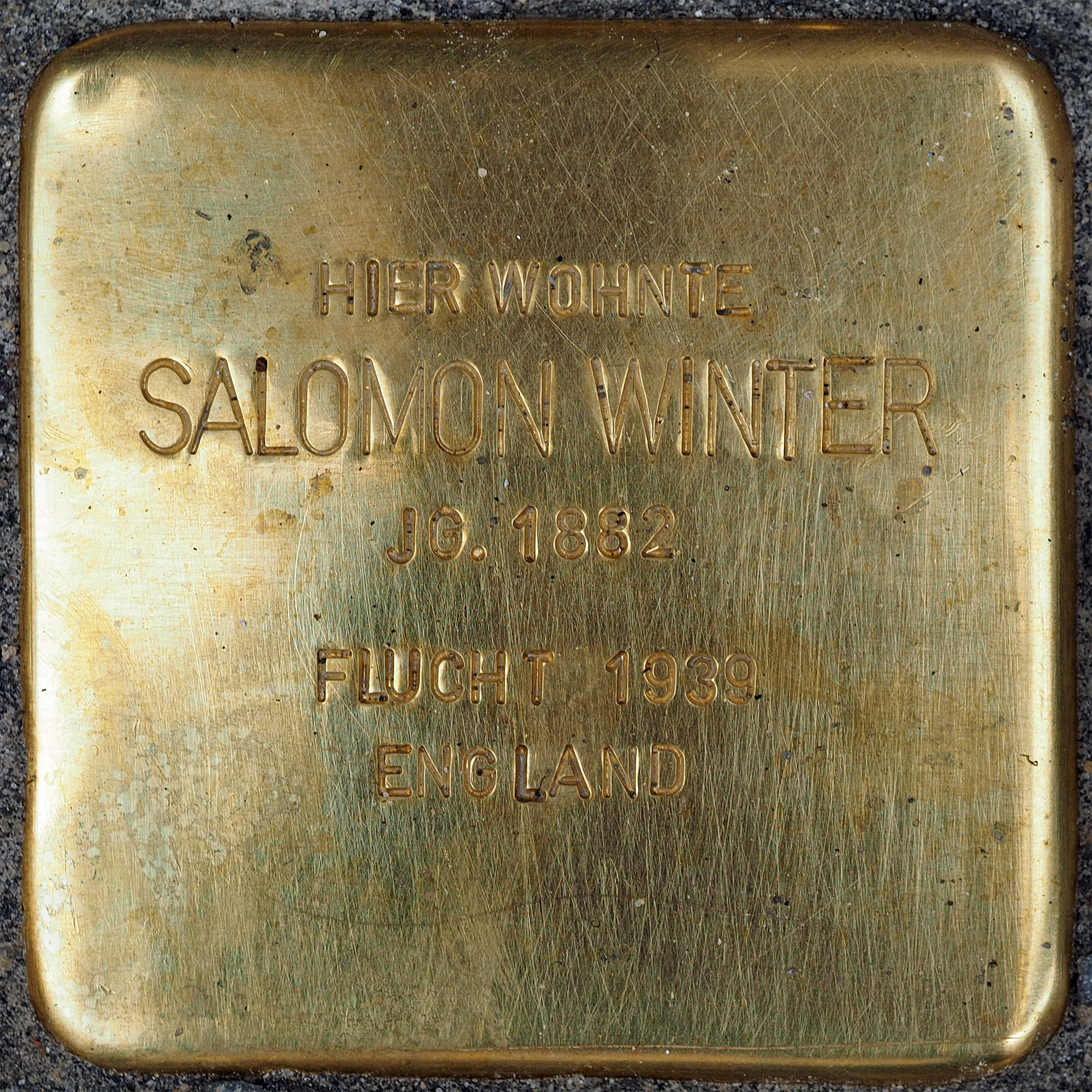 Stolpersteine Kempen: Winter, Salomon